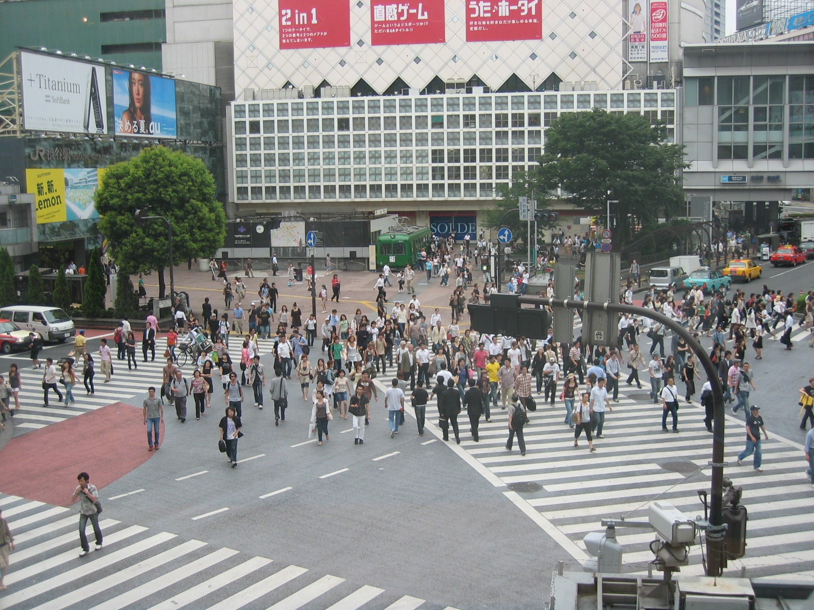 Cruce de Shibuya